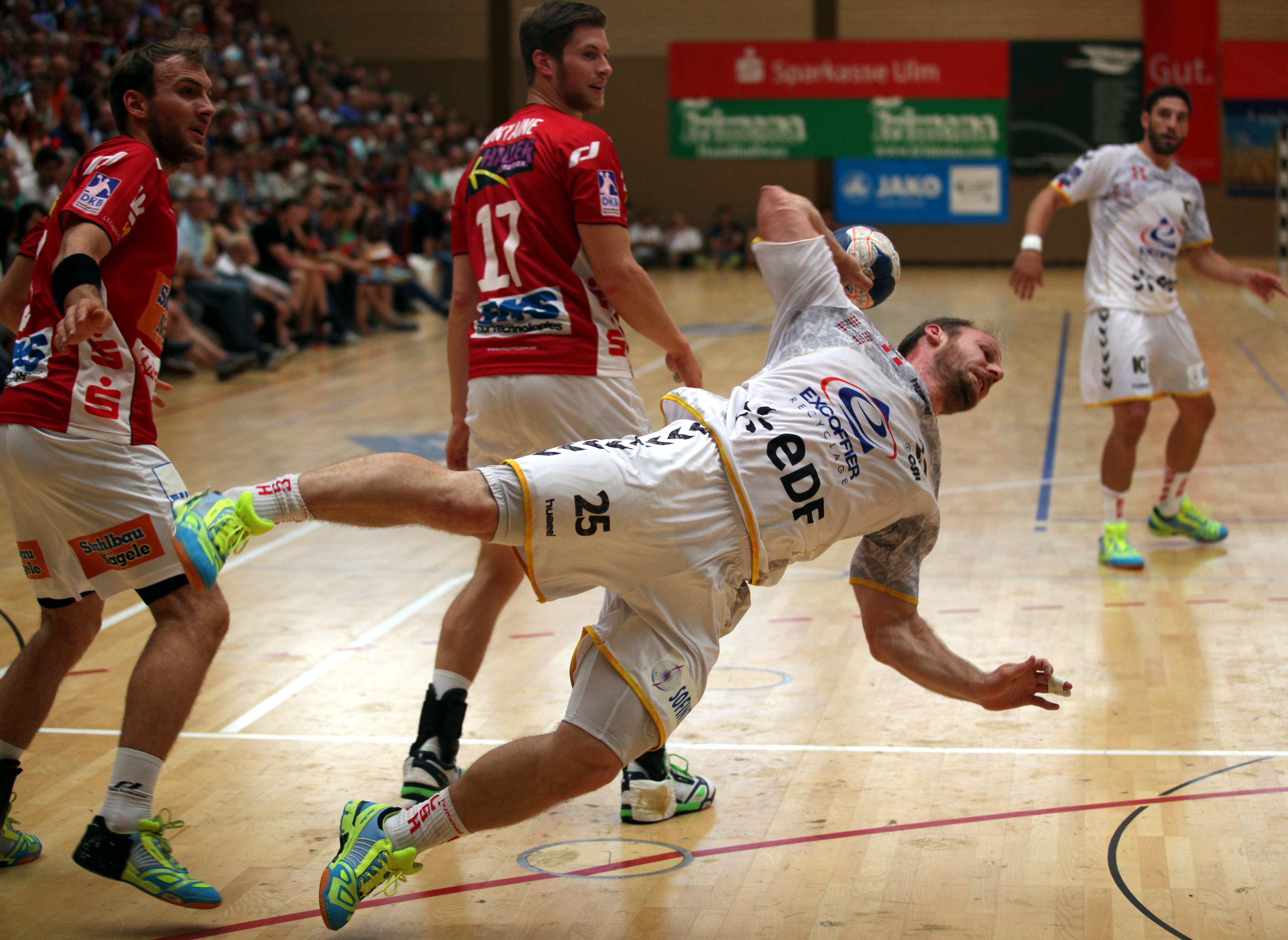 Grégoire Detrez, Handballspieler von Chambéry Savoie Handball am 17. August 2014 beim Sparkassen-Cup in Ehingen.